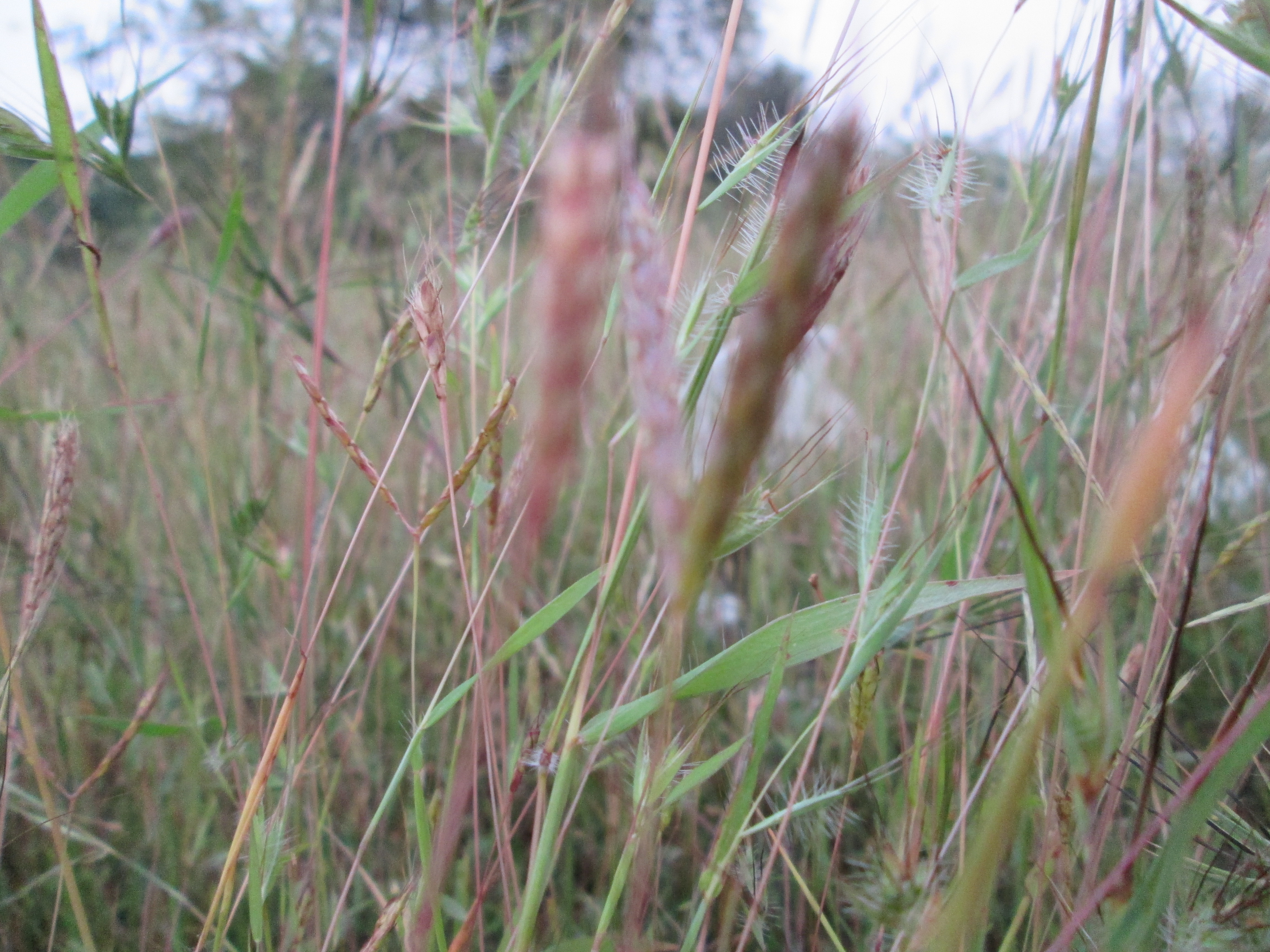 शेतातील क्षण